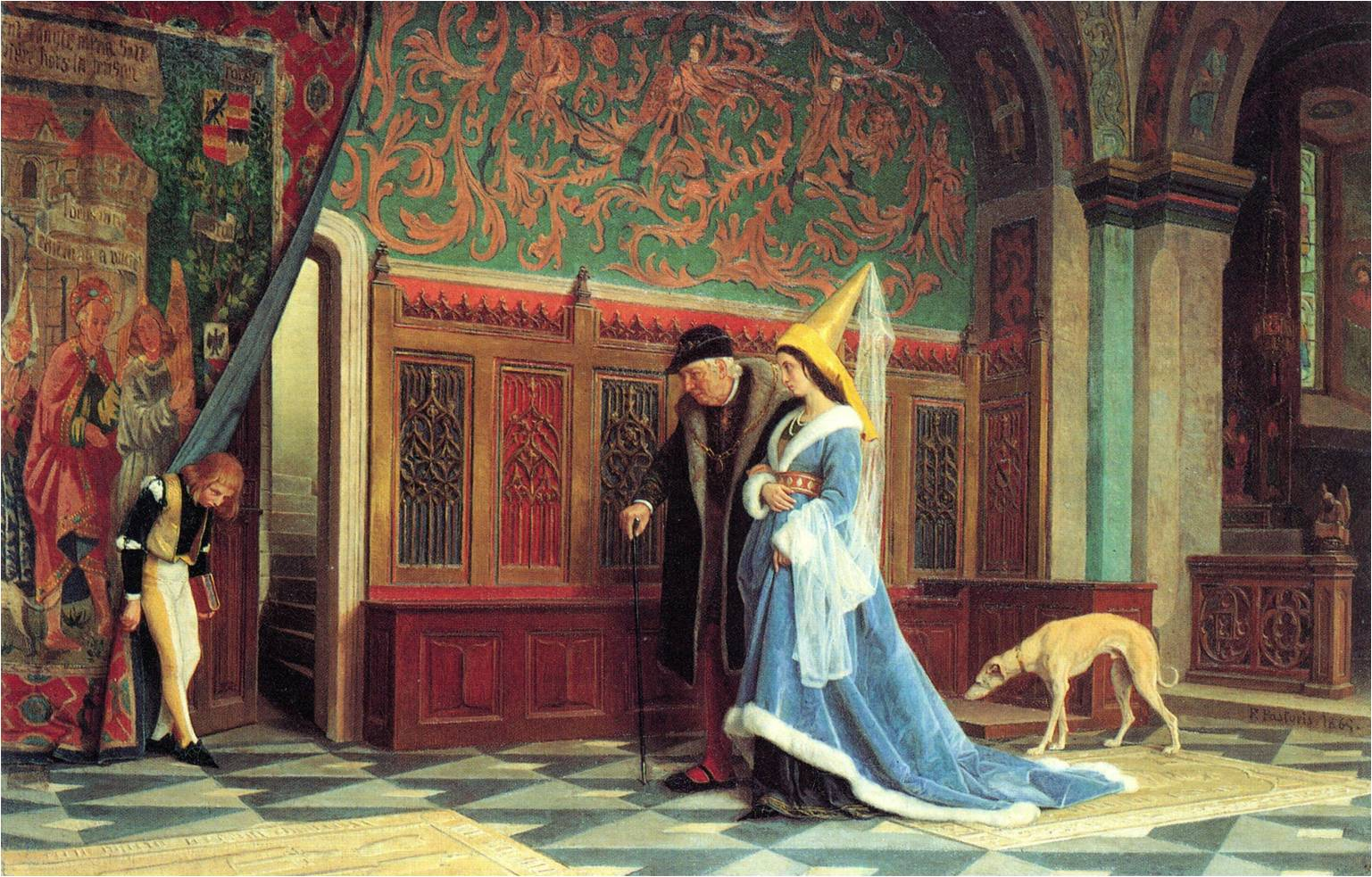 I signori di Challant (sec.XV) di Federigo Pastoris del 1865. Olio su tela, conservato a Torino, Civica Galleria d'Arte Moderna (fotografia a Torino, Archivio Fotografico dei Musei Civici). La tela ebbe parecchia fortuna, lo sfondo della scena è la Cappella del Castello di Issogne, in cui gli stalli sono rappresentati minuziosamente.